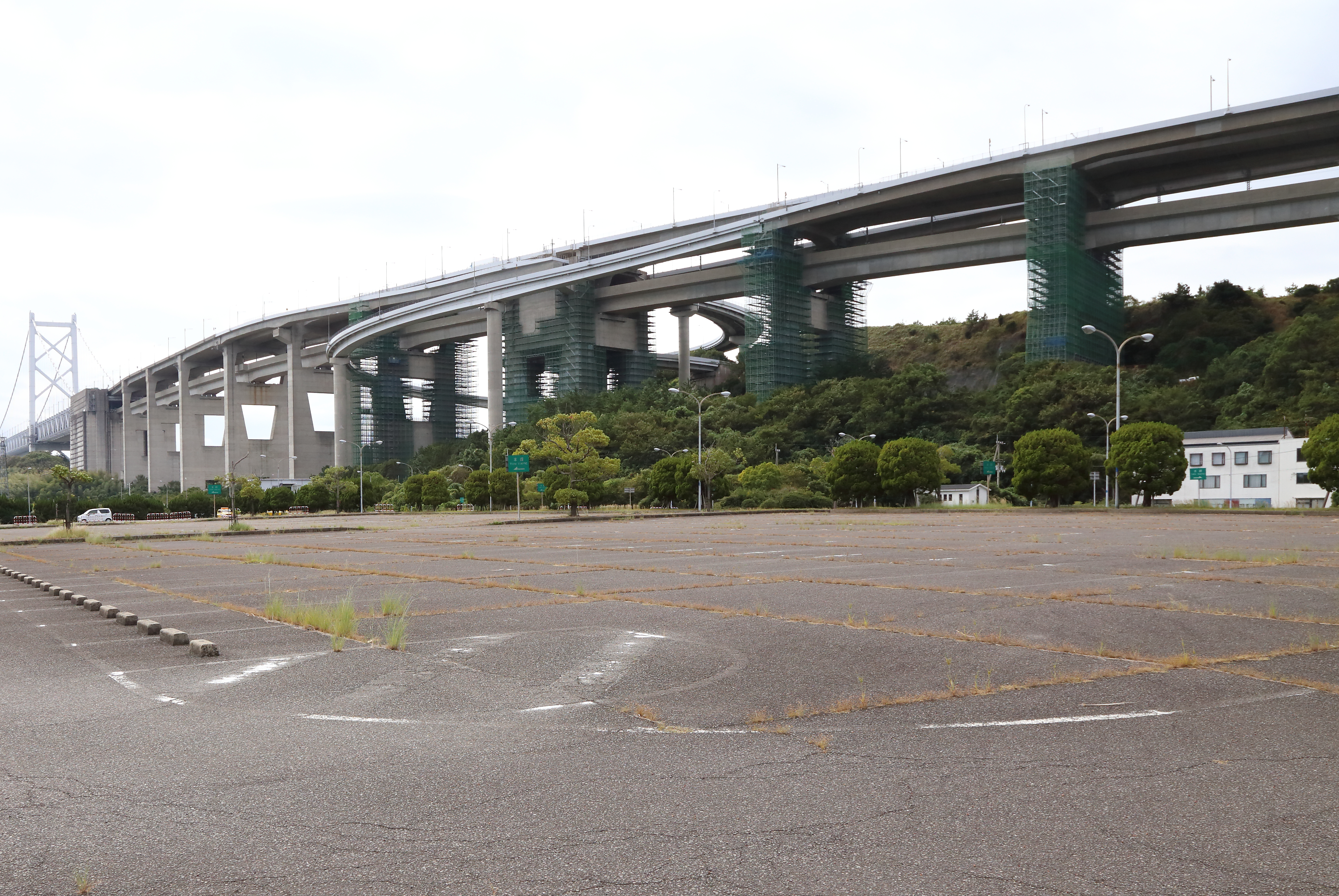 与島高架橋 ※与島橋と北備讃瀬戸大橋の間の橋 与島内だけに架かる高架橋 香川県坂出市与島町